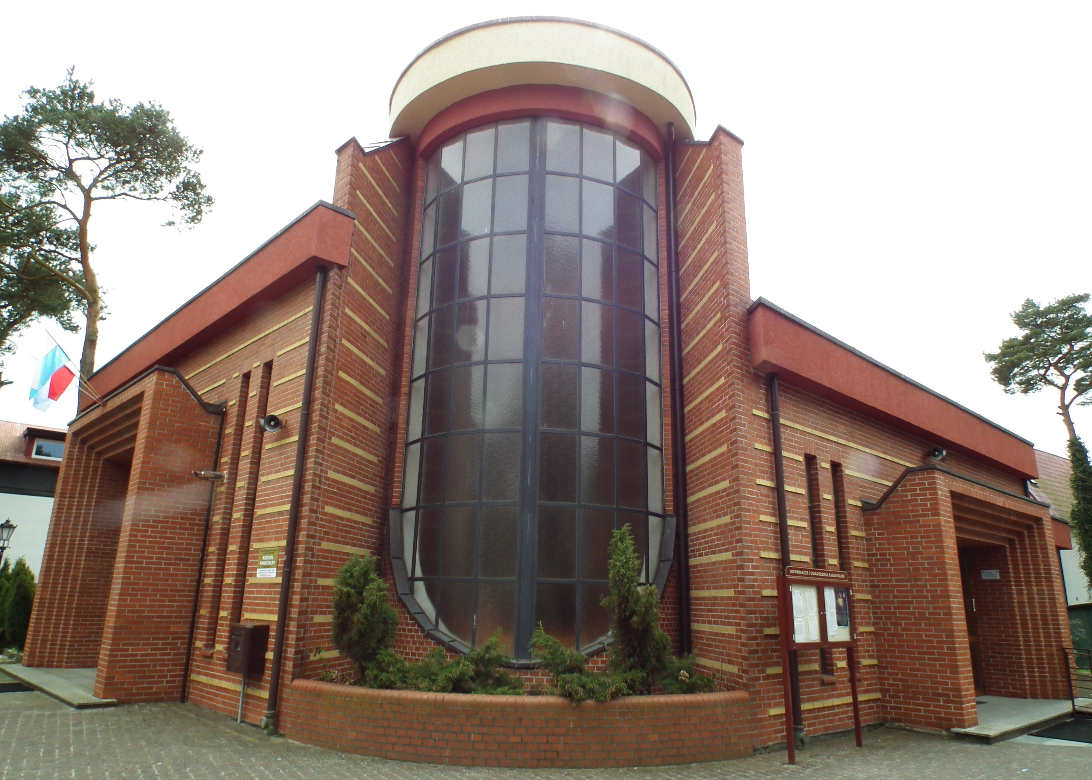 Kościół św. Satnisława BM w Niechorzu.